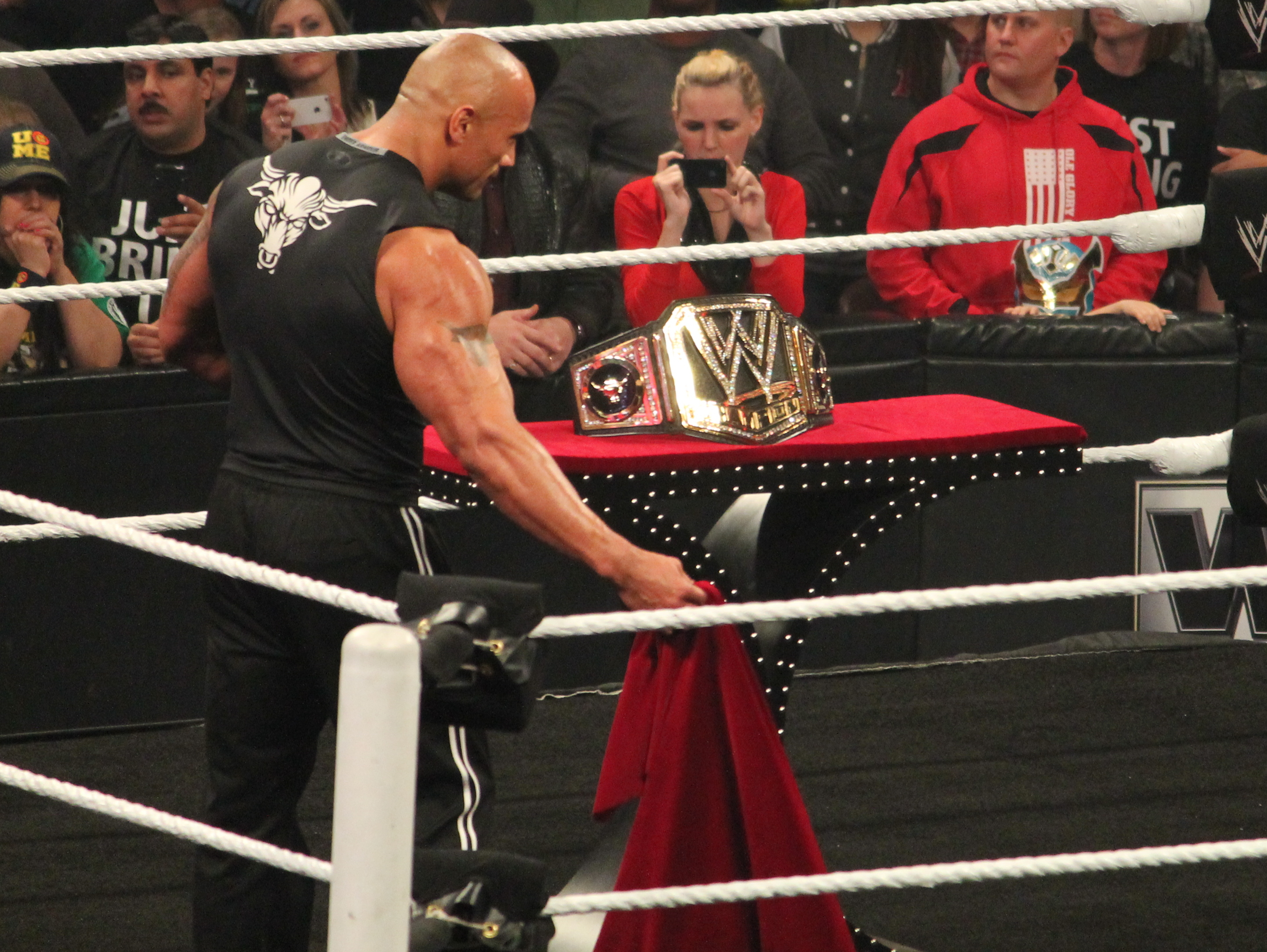 new belt